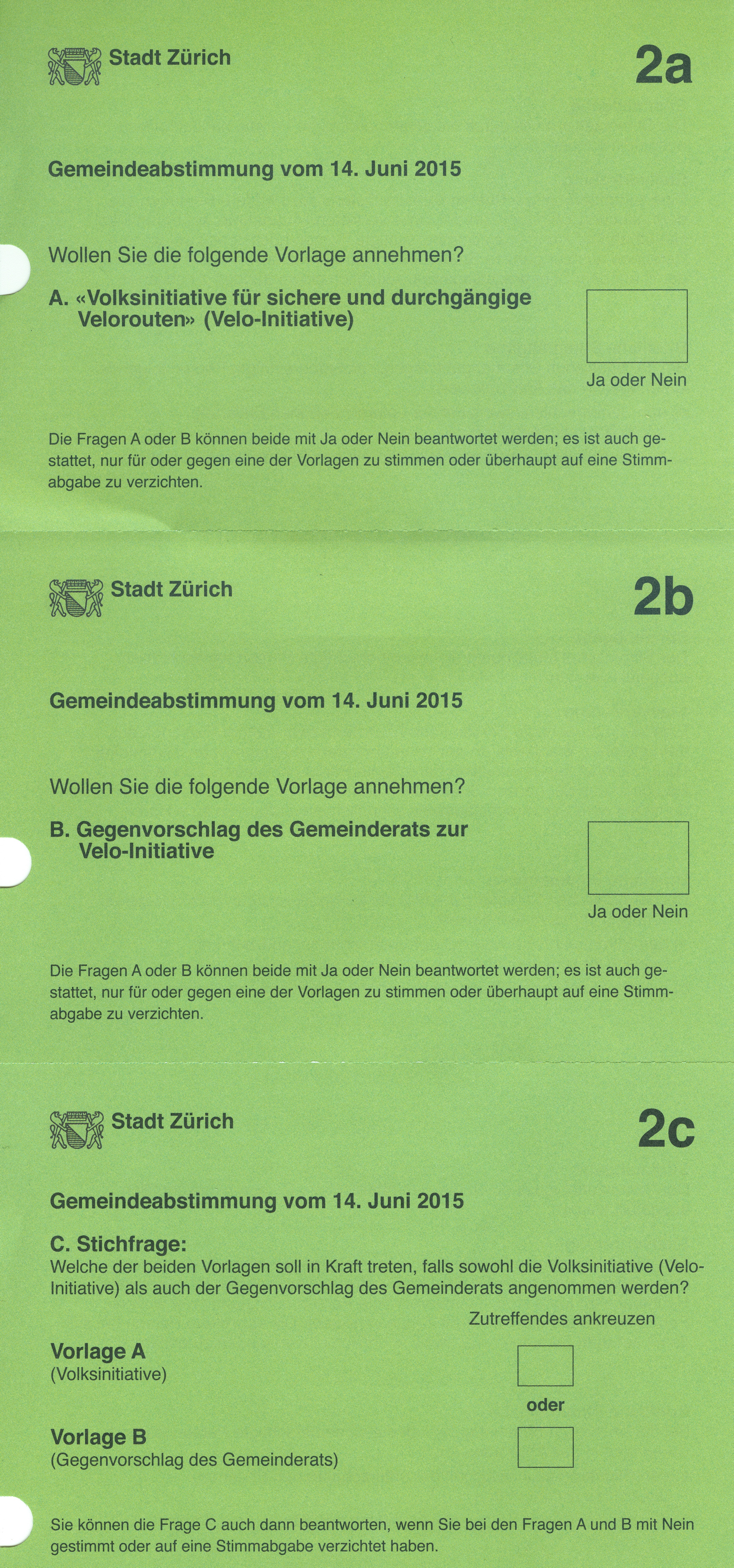 Abstimmungsunterlagen vom 14. Juni 2015 der Stadt Zürich